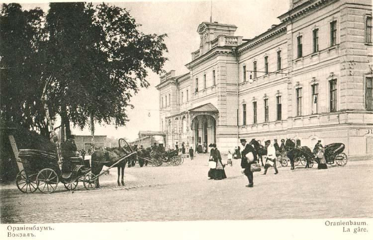 Вокзал Ораниенбаум до революции 1917 года.